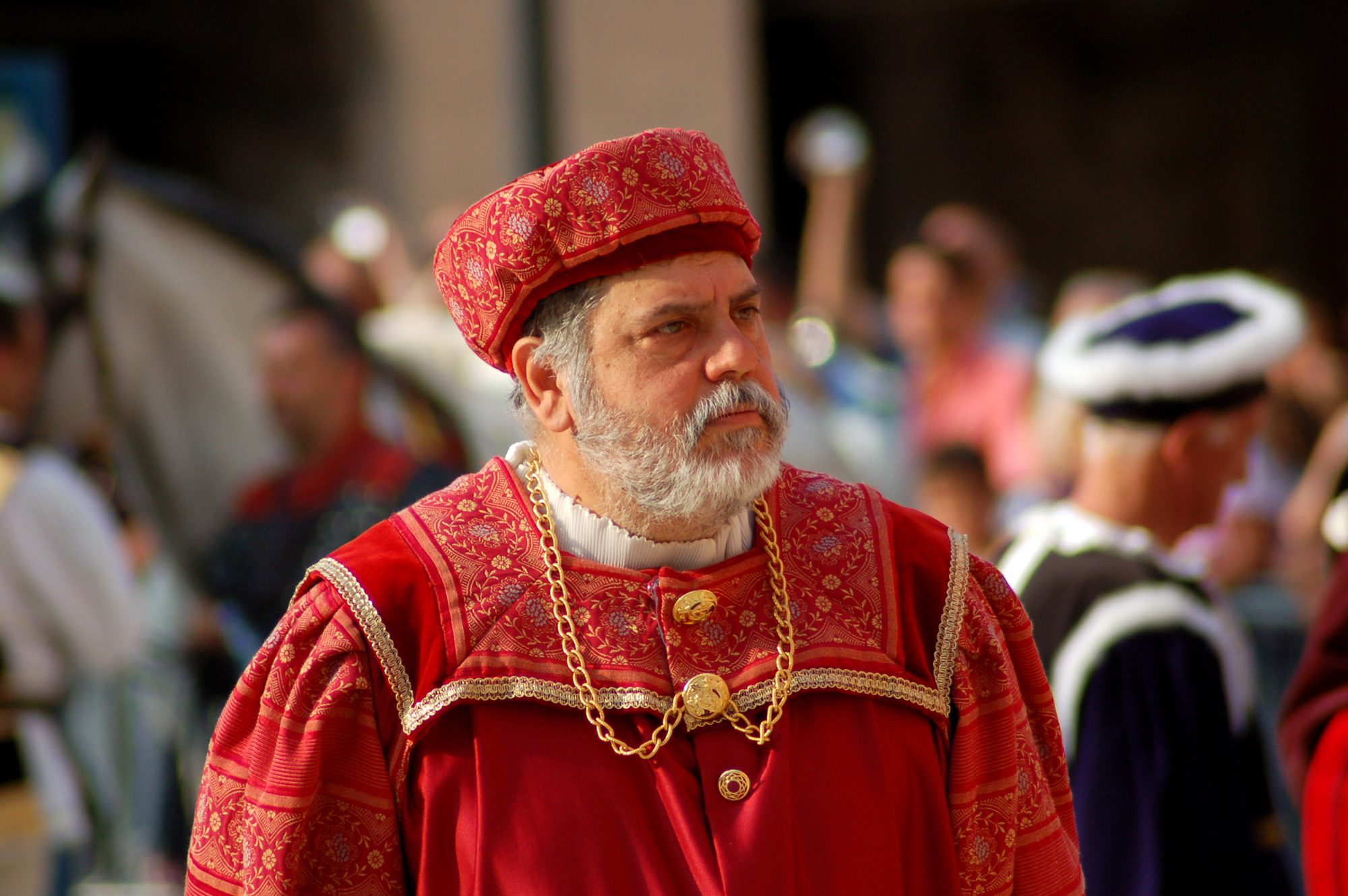 Palio del Velluto 2006